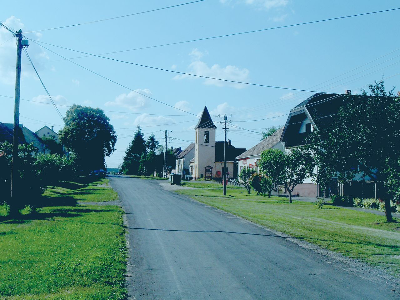 Main street in Rábamolnári (Püspökmolnári), Hungary